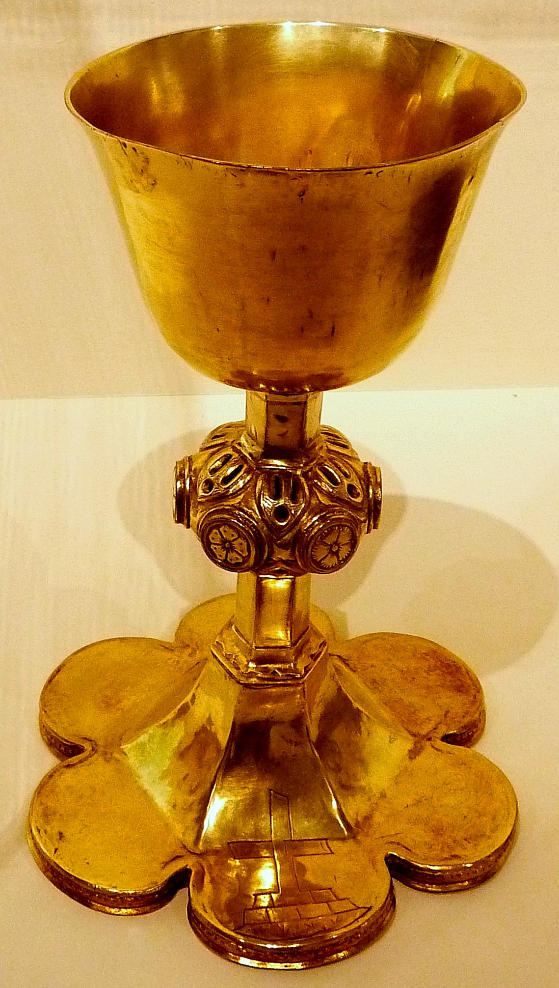 Camors, église Saint-Sané : calice en argent doré et émaux datant du XVe siècle (orfèvre breton inconnu, commune de Camors)